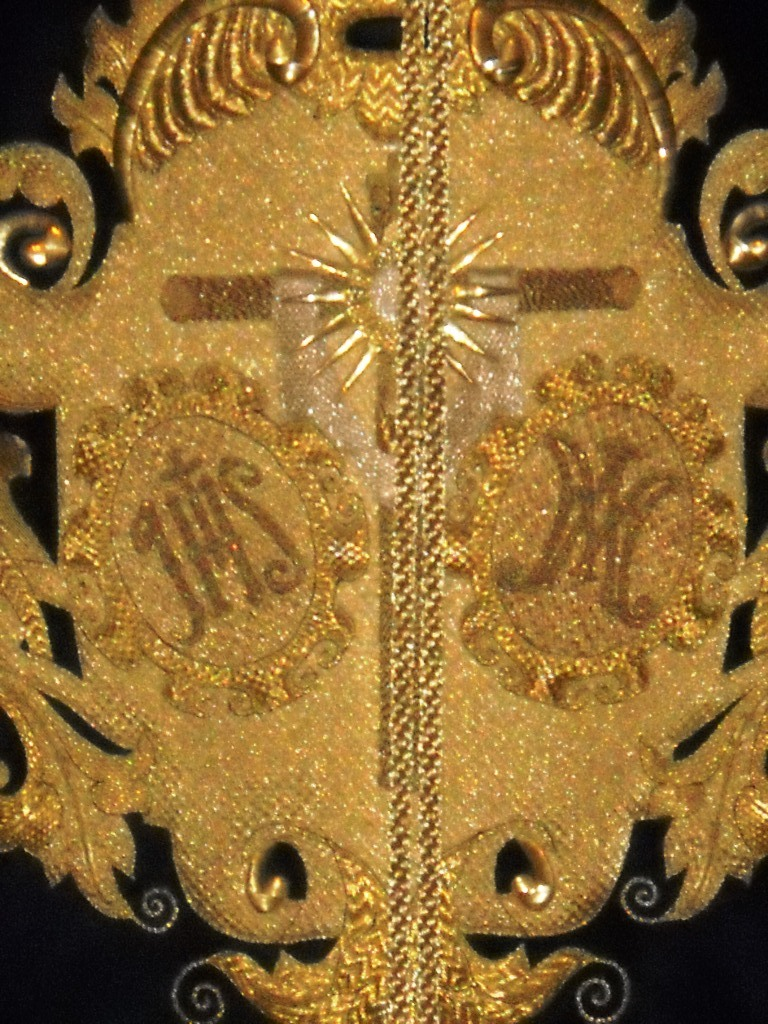 Escudo que aparece en el bacalao de la Hermanda de Torreblanca